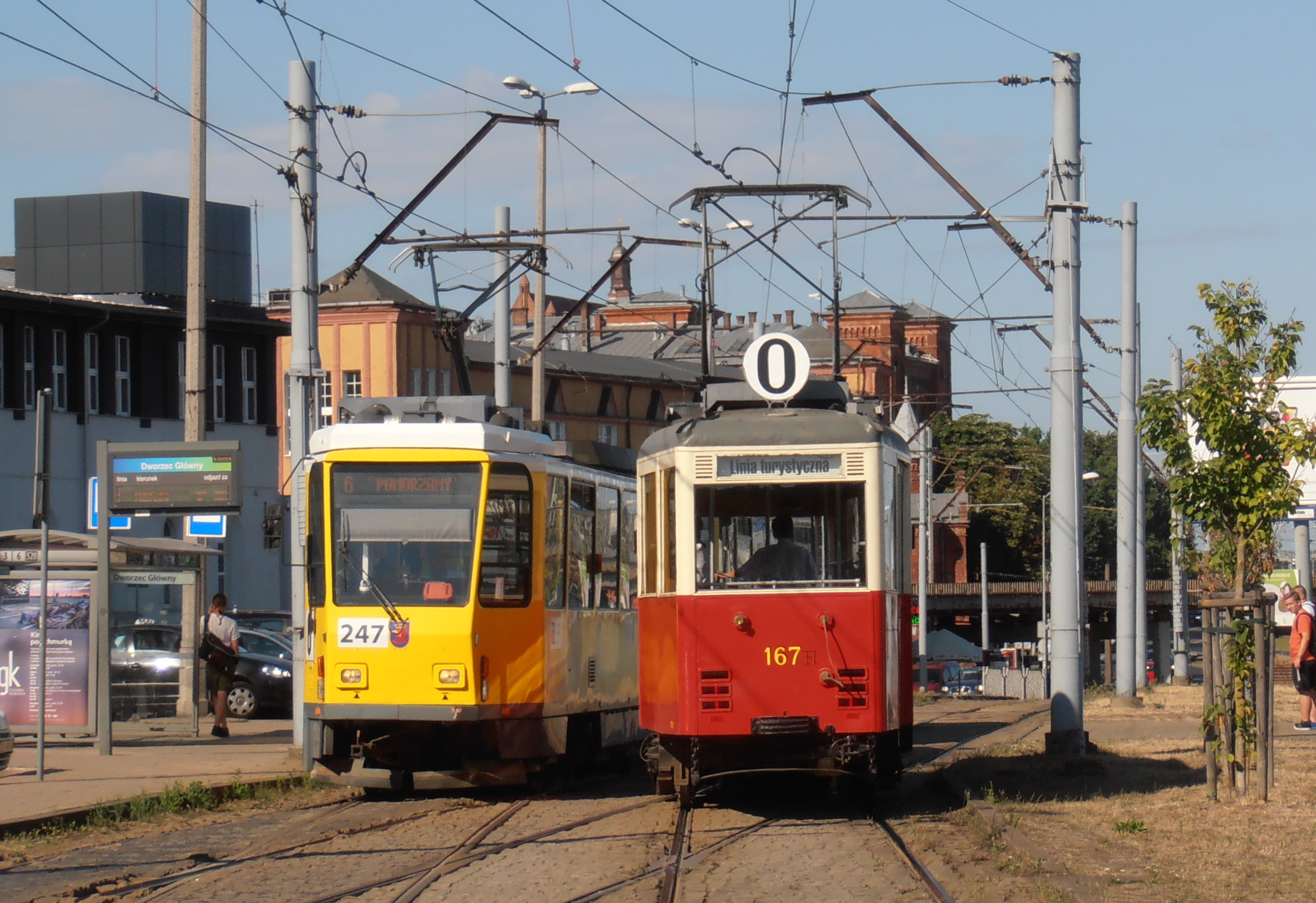 Mijające się tramwaje typu Tatra TA62D (linia nr 6) oraz Konstal N (linia nr 0) w Szczecinie, lipiec 2018 r.